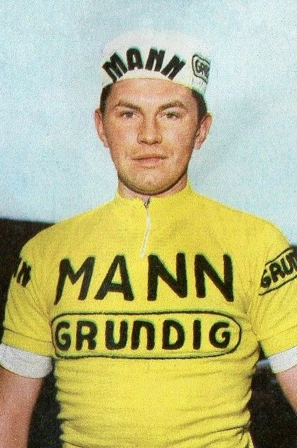 Figurina CAMPIONI dello SPORT 1969/70-n.214- VAN RYCKEGHEM-BELGIO -CICLISMO-Rec